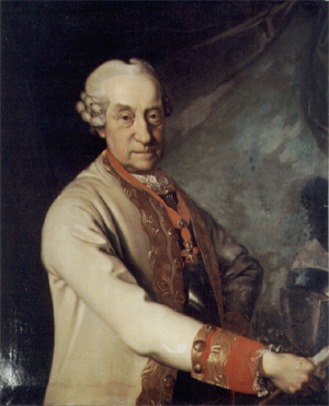 Portrait of Joseph Friedrich von Sachsen-Hildburghausen (1702-1787)